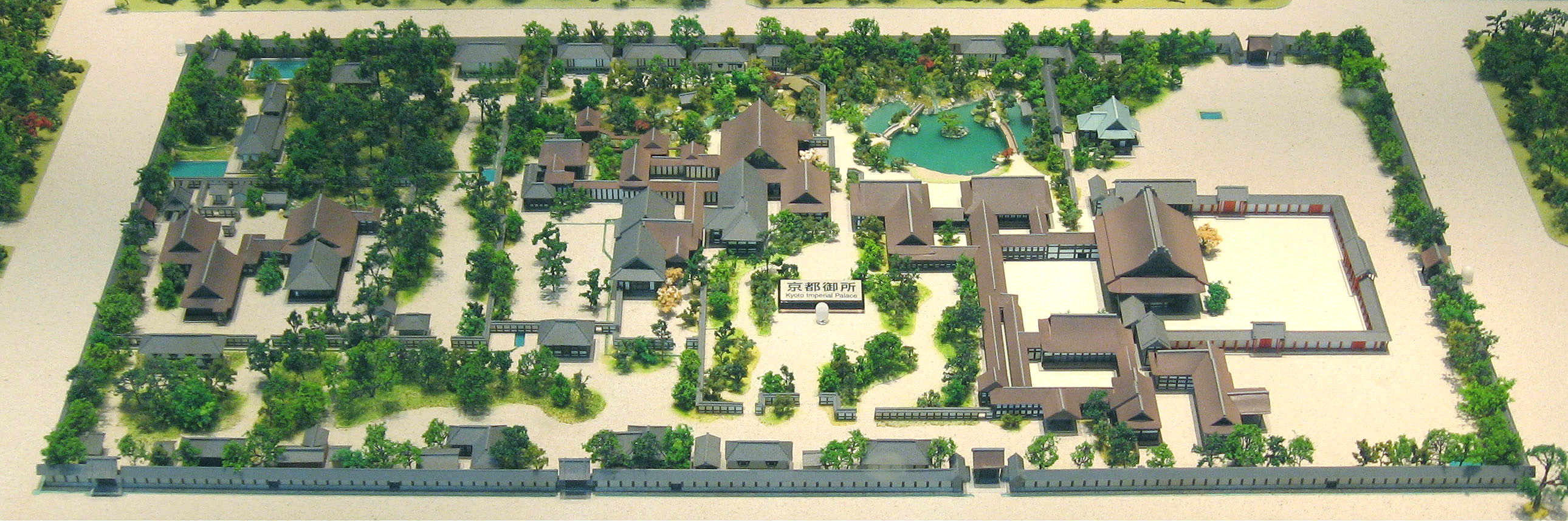 Киотский Императорский дворец